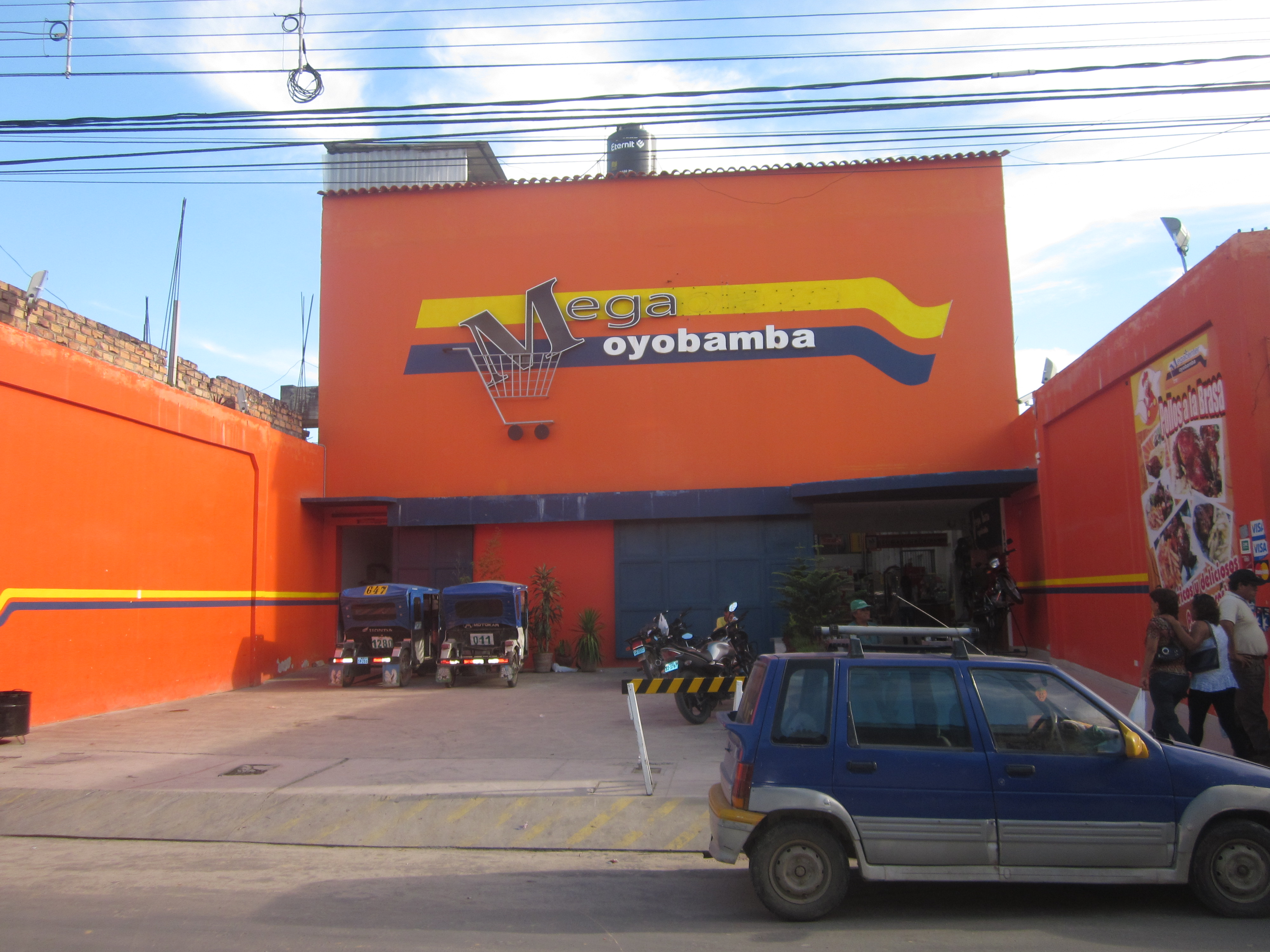 El Supermercado mas grande de toda la Region de San Martin